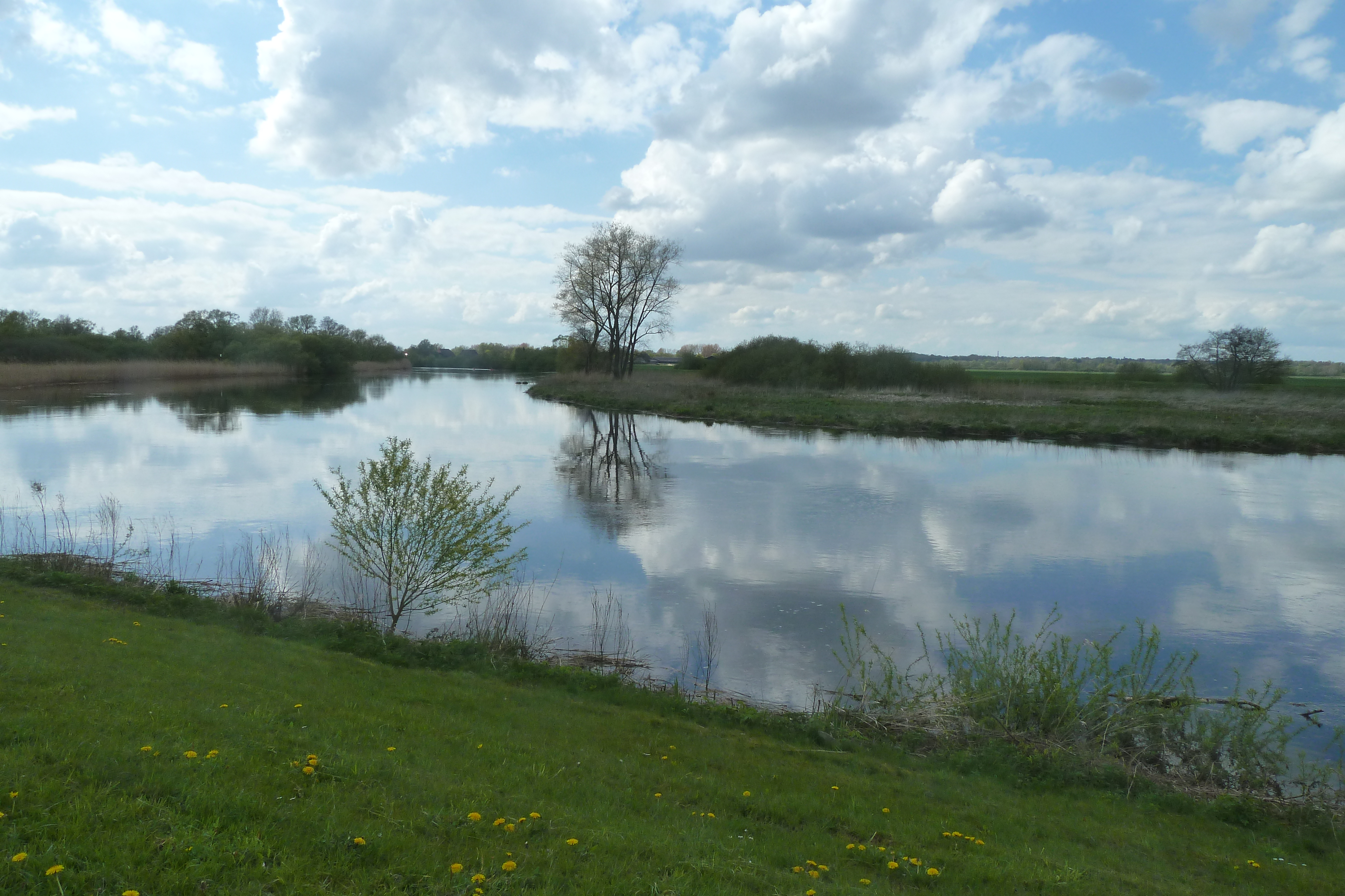 Der Unterlauf der Wümme schlängelt sich durch das Marschland; NSG „Untere Wümme“, Blockland, Bremen.